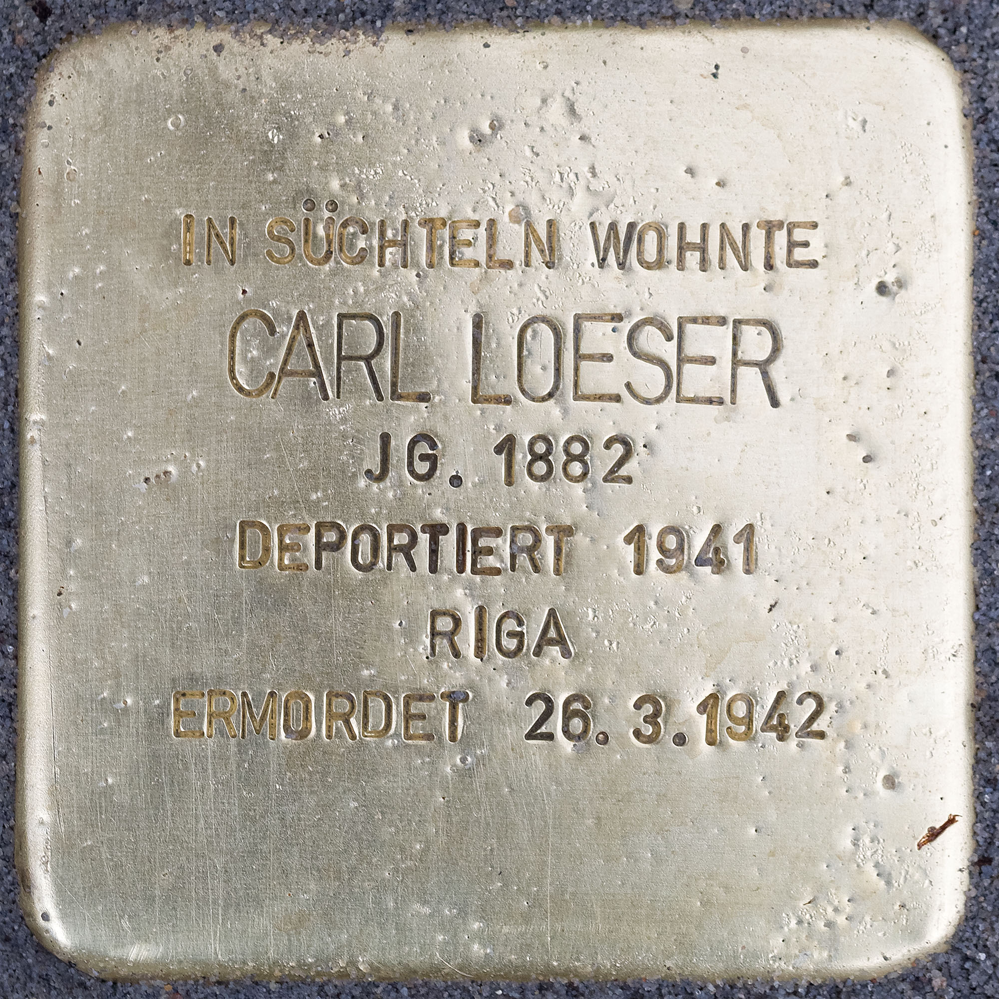 Stolpersteine Suechteln: Loeser, Carl